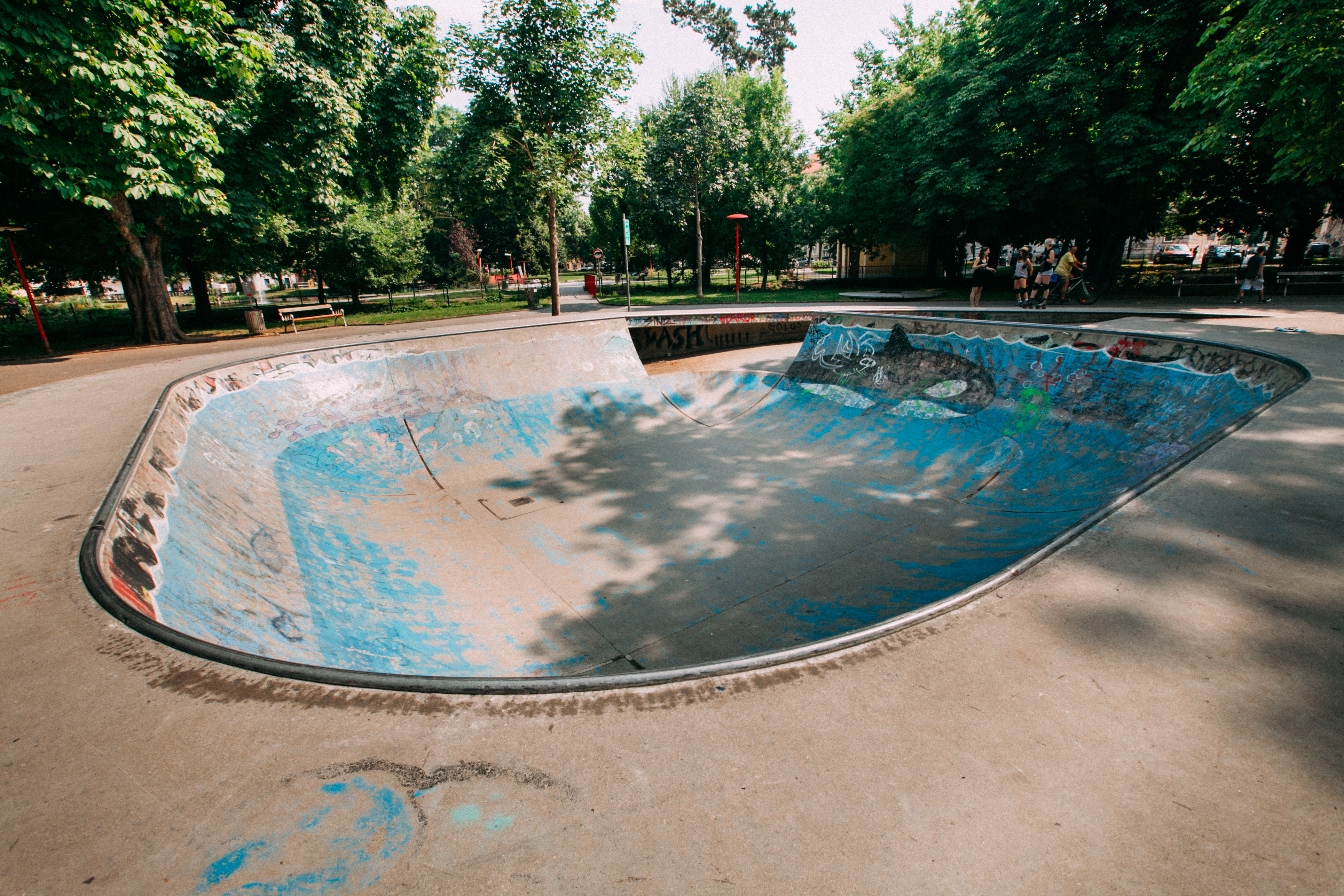 Die Skateranlage im Volksgarten Graz